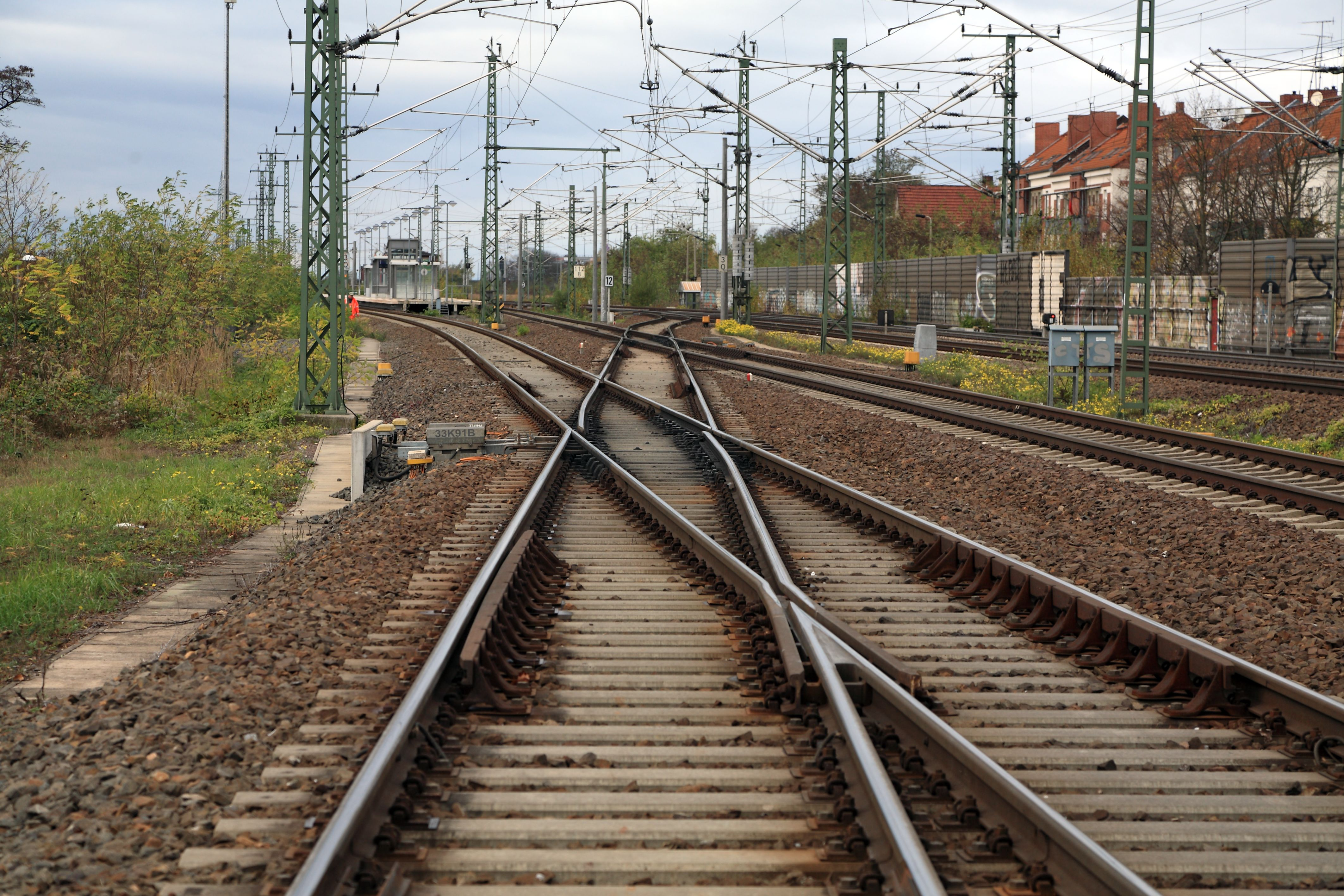 Die niveaugleiche Querung der S-Bahn-Strecke 6382 mit der Güterringstrtecke 6380 Leutzsch–Wahren wurde für letztere nur eingleisig ausgeführt.